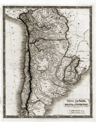 Mapa de Bolivia y Perú en el año 1811